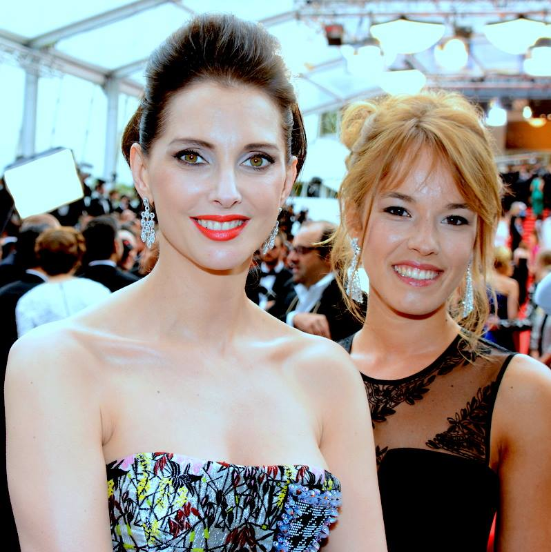 Frédérique Bel et Elodie Fontan au festival de Cannes